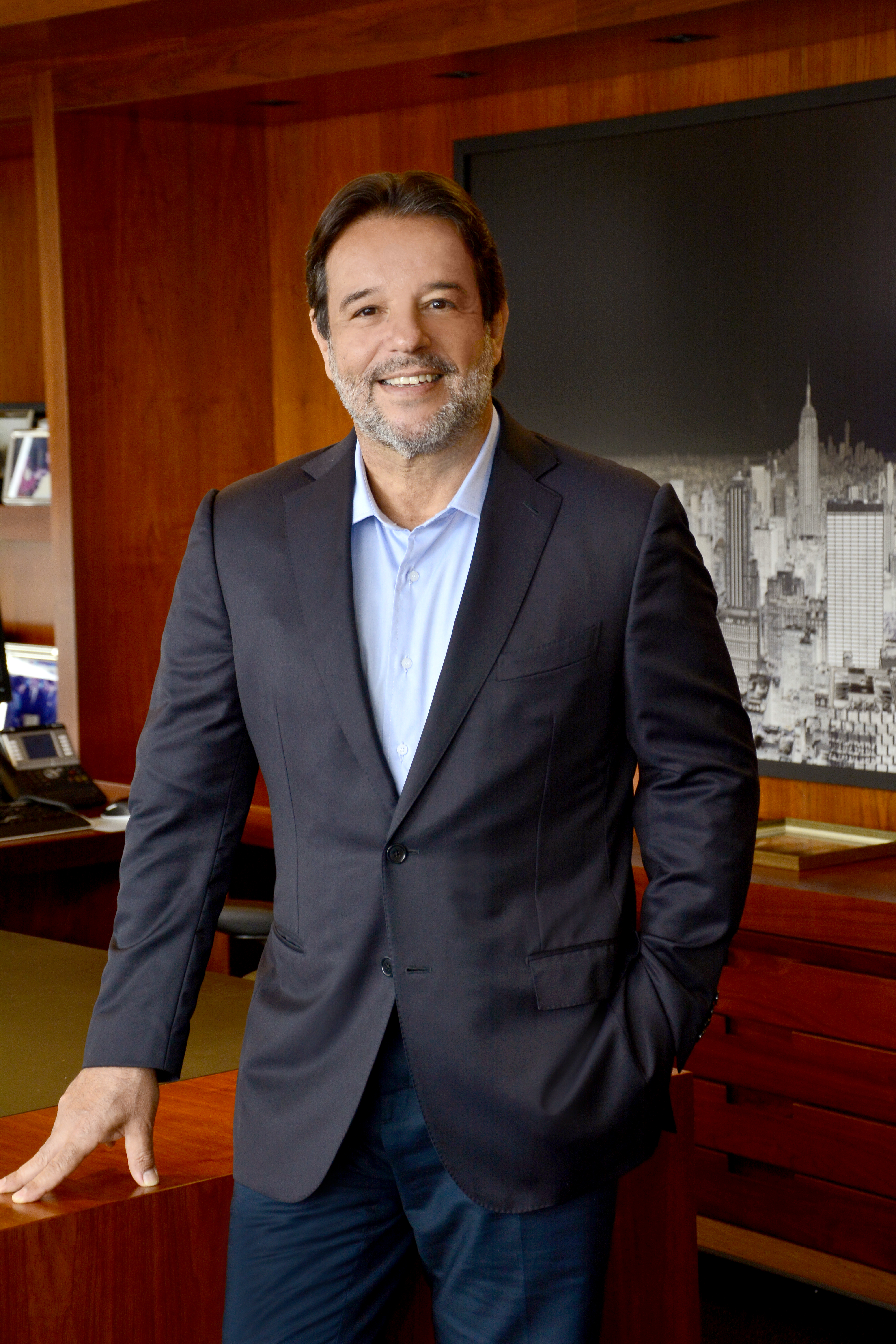 Empresário brasileiro, ex-presidente do Grupo RBS.